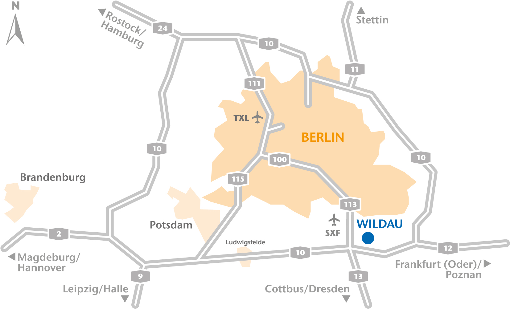 TH Wildau